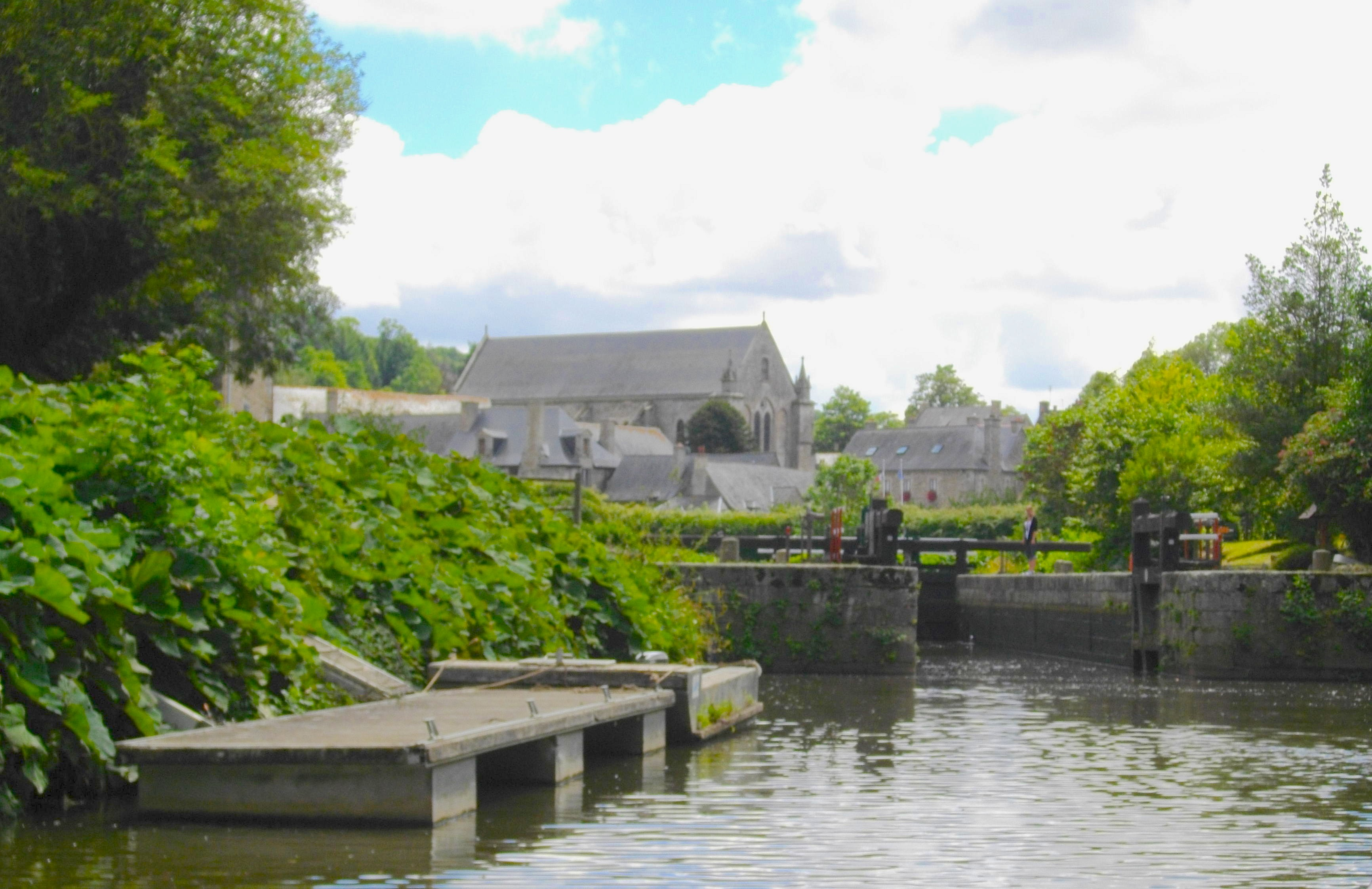 Village de Léhon (Côtes-d'Armor). Ecluse n°47 sur le Canal de Dinan à Rennes.